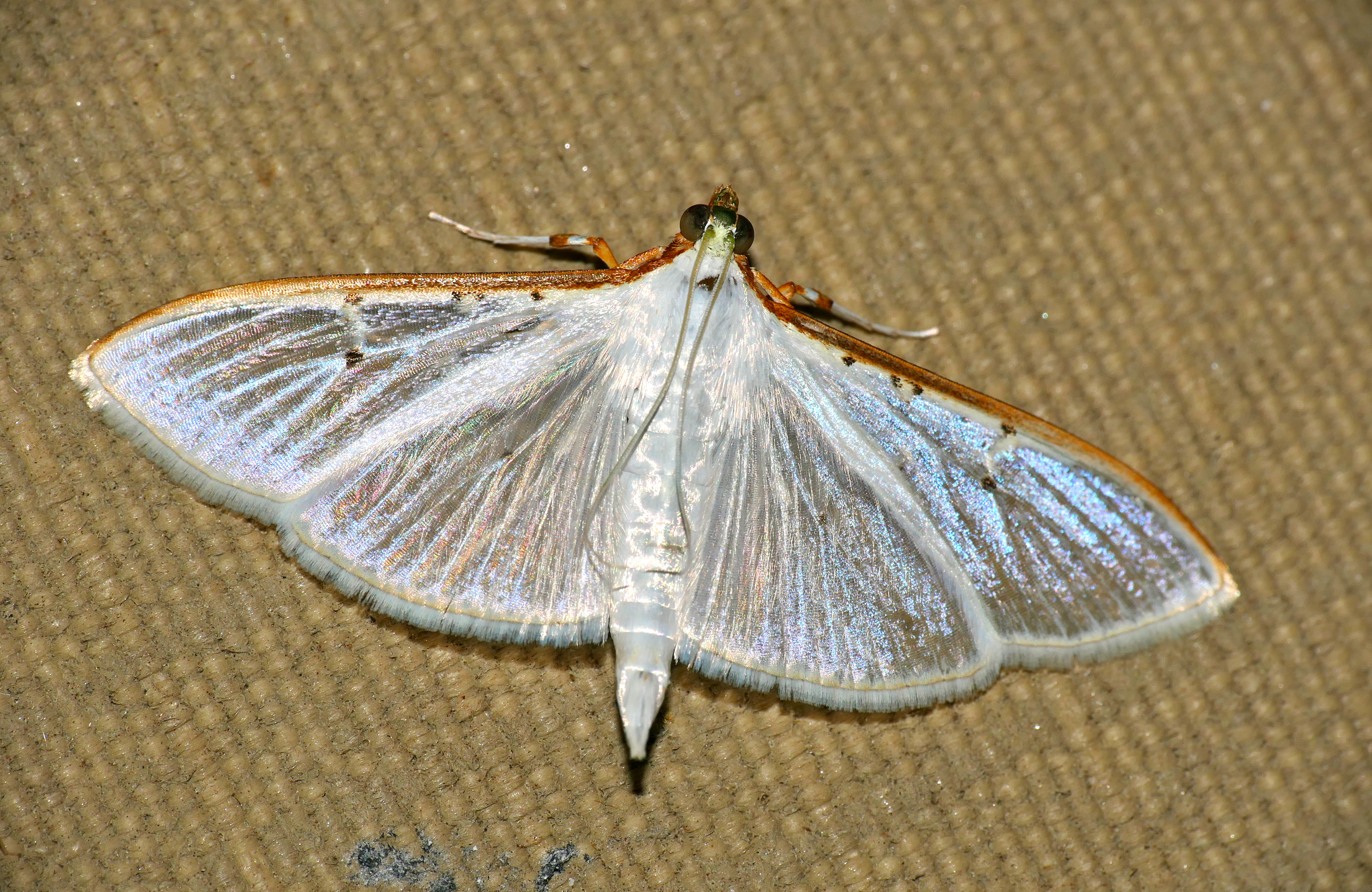 Lower Sabie Camp, Kruger NP, SOUTH AFRICA